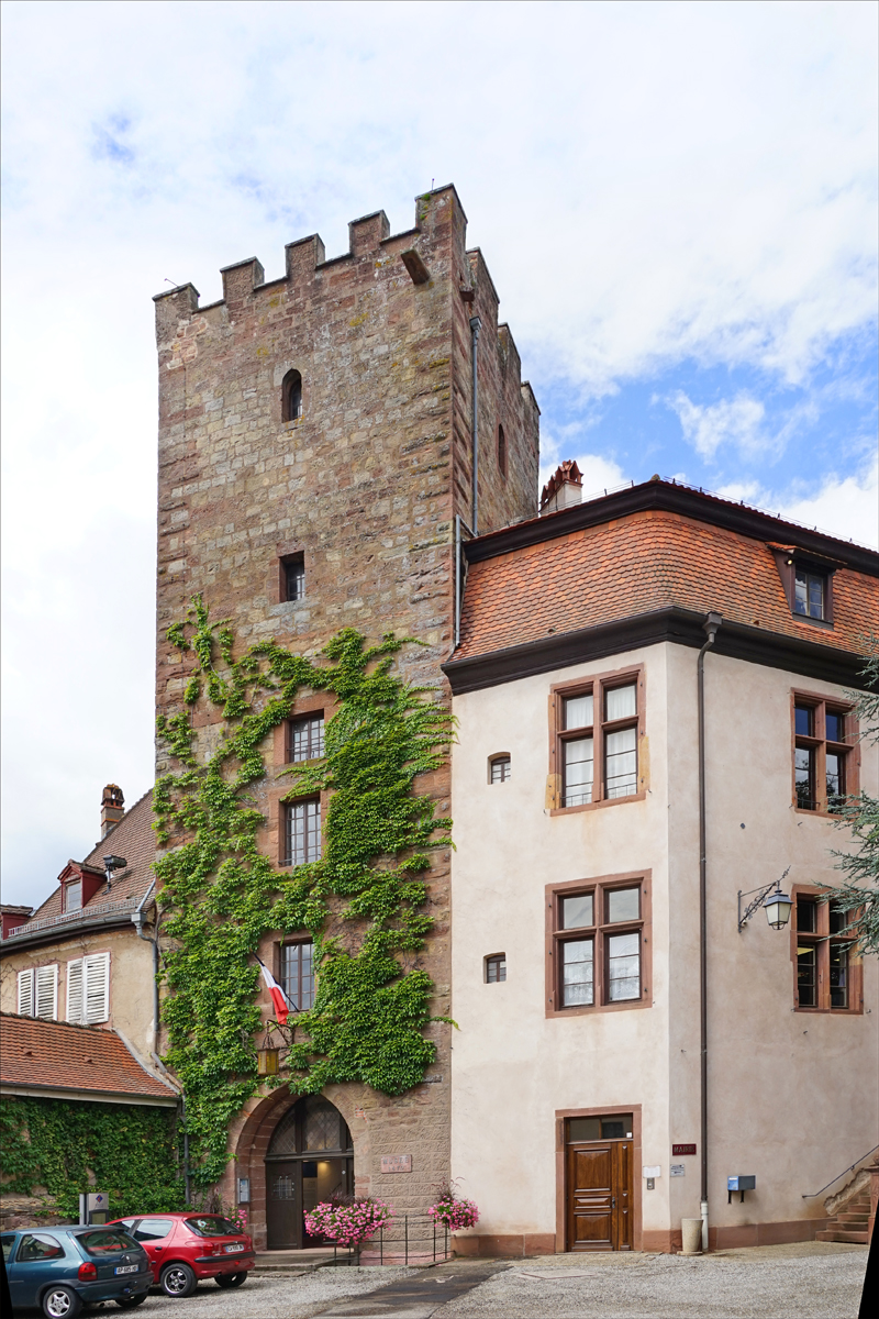 Le musée est installé dans l'ancien donjon du château Le musée de la bataille du 6 août 1870 est situé dans l'ancien donjon du château à Woerth en Alsace. Il fait partie des musées du Parc régional des Vosges du nord. Il est consacré à la bataille du 6 août 1870 entre l'armée française (positionnée à Froeschwiller) et les armées allemandes coalisées autour de la Prusse (positionnées à Woerth). Le nom de Reichshoffen lui a été historiquement associé alors qu'elle ne s'y est pas déroulée. Cette bataille, qui a fait 20.000 morts dans les deux camps, marque le début de la guerre franco-allemande de 1870-1871 perdue par la France et qui a abouti à l'annexion par l'Allemagne de l'Alsace et de la Lorraine (région de Metz). Les répercussions de cet affrontement ont été considérables car les deux grandes guerres, qui se sont produites au XXè siècle, en sont le prolongement. Le musée de Woerth vient de rouvrir après une période de rénovation. La visite du musée peut être complétée par celle du champ de bataille et des monuments français et surtout allemands qui y ont été érigés. En effet, cette région a fait l'objet durant l'occupation allemande jusqu'en 1918 d'un tourisme important de la part des allemands venant célébrer le sacrifice de leurs soldats.